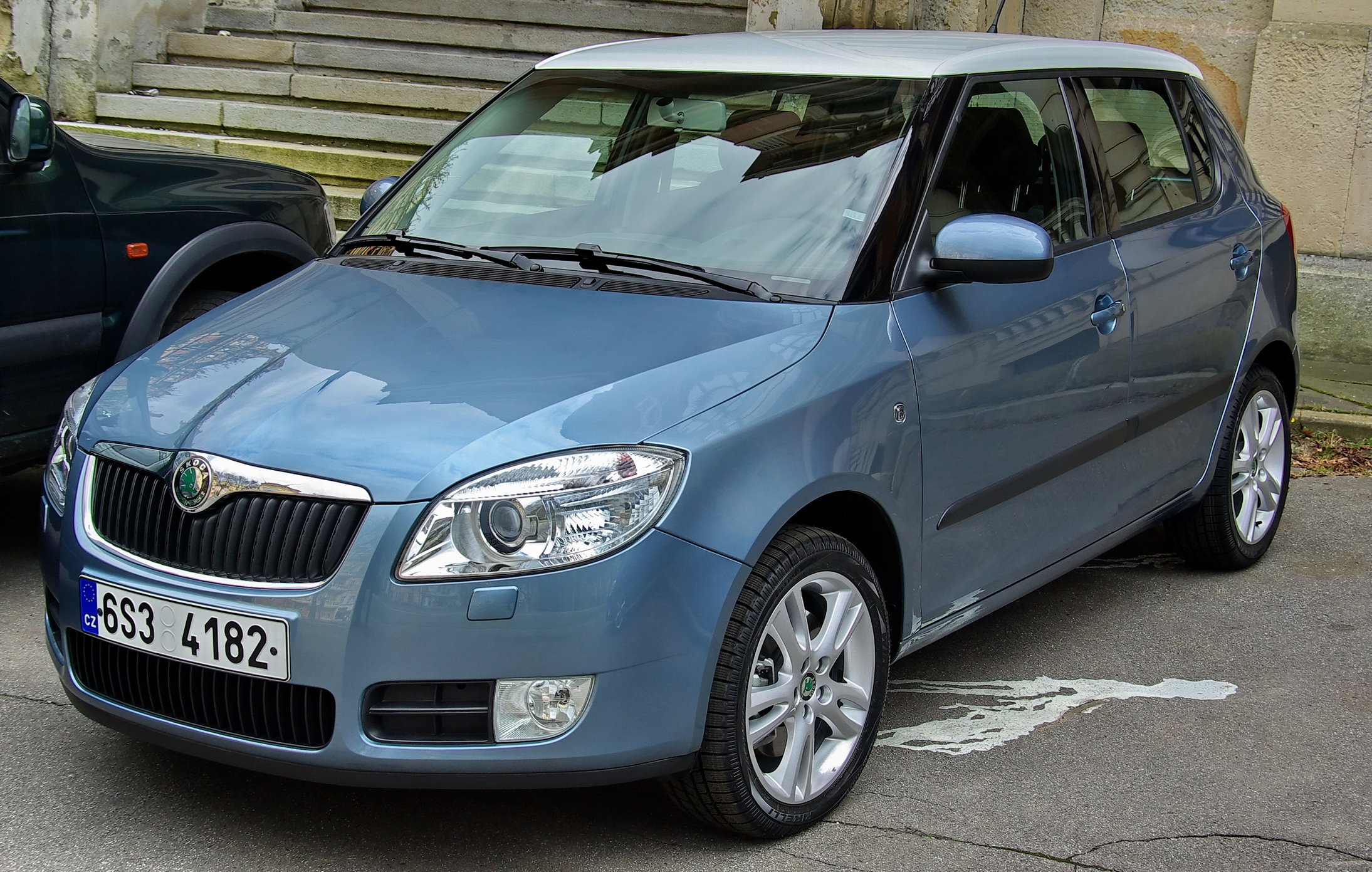 Škoda Fabia II in Bicolor-Lackierung, aufgenommen in Karlsbad